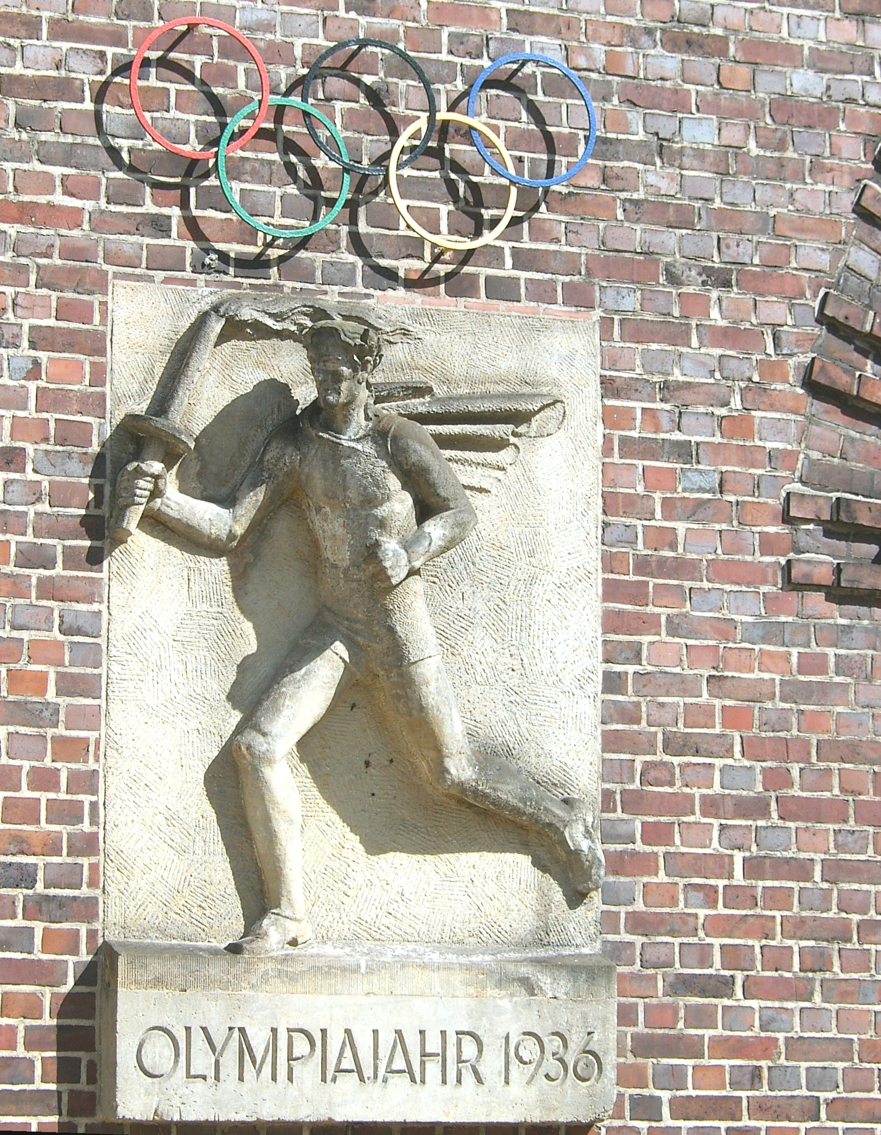 Plastik von Richard Kuöhl am Altstädter Hof in Hamburg-Altstadt. Sie weist auf das Jahr des Baubeginns 1936 hin. This is the photograph of an architectural monument. It is part of the list of cultural monuments of Hamburg, no. 684